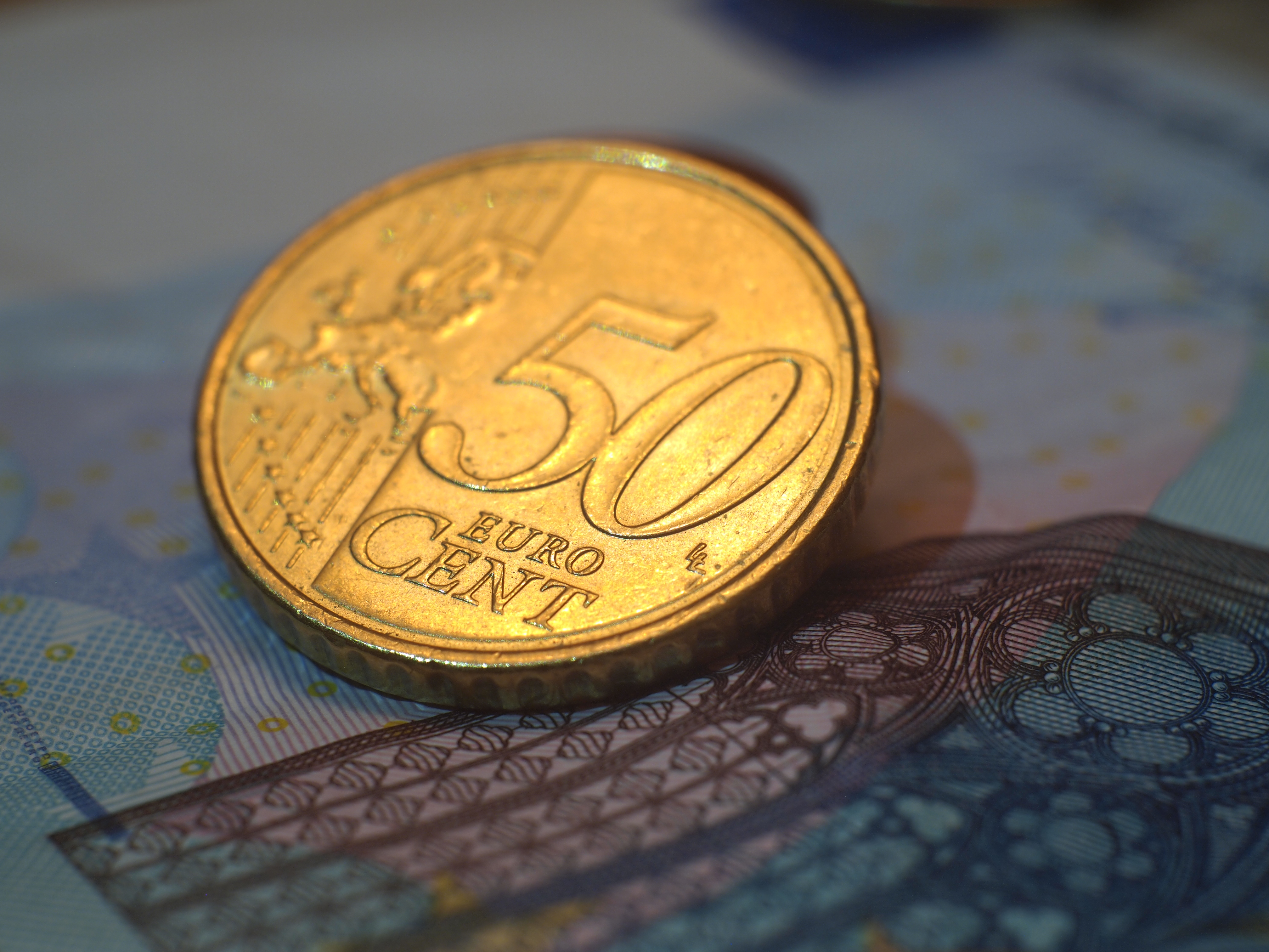 0.5 Евро, монета.